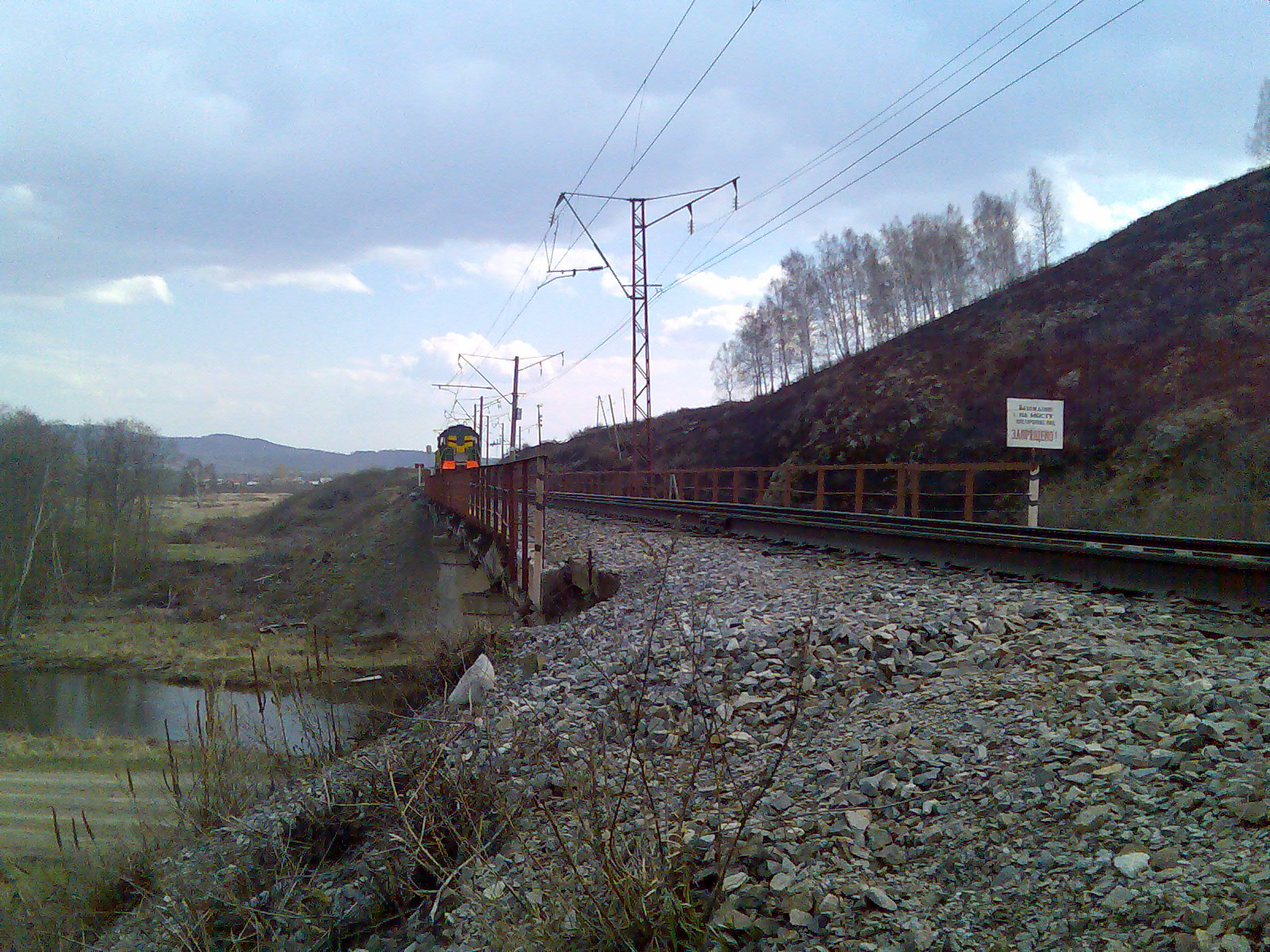 Ж/д мост через реку Малый Кизил. Автотрасса P-316. Видно село Муракаево